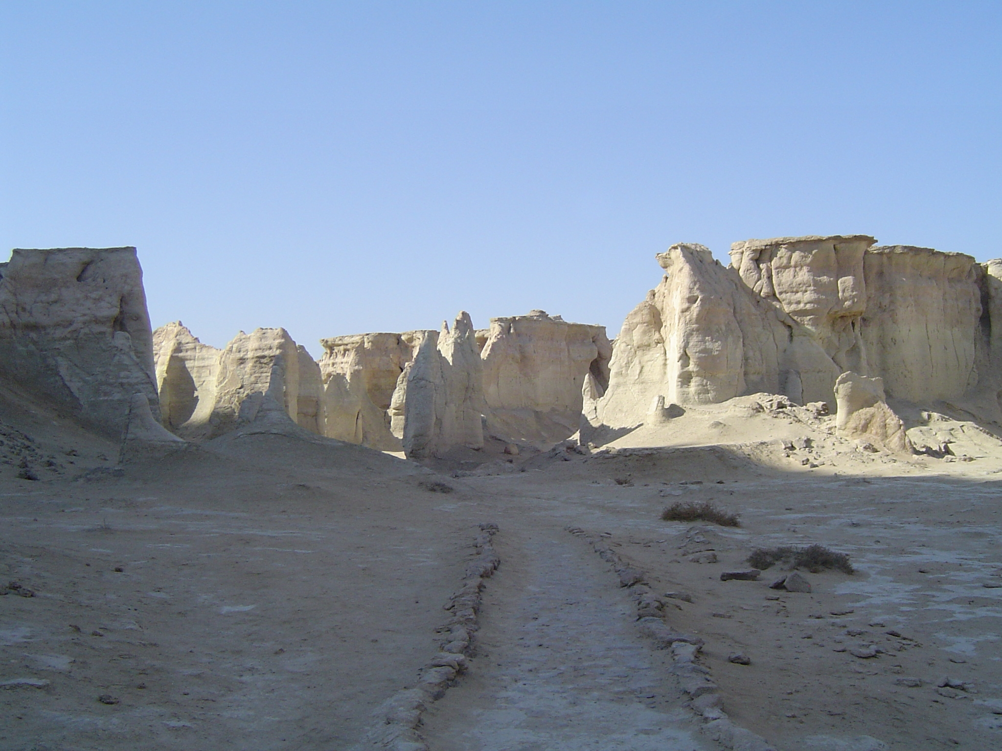 عکس دره ستارگان - جزیره قشم - پائیز 1386 (2007)